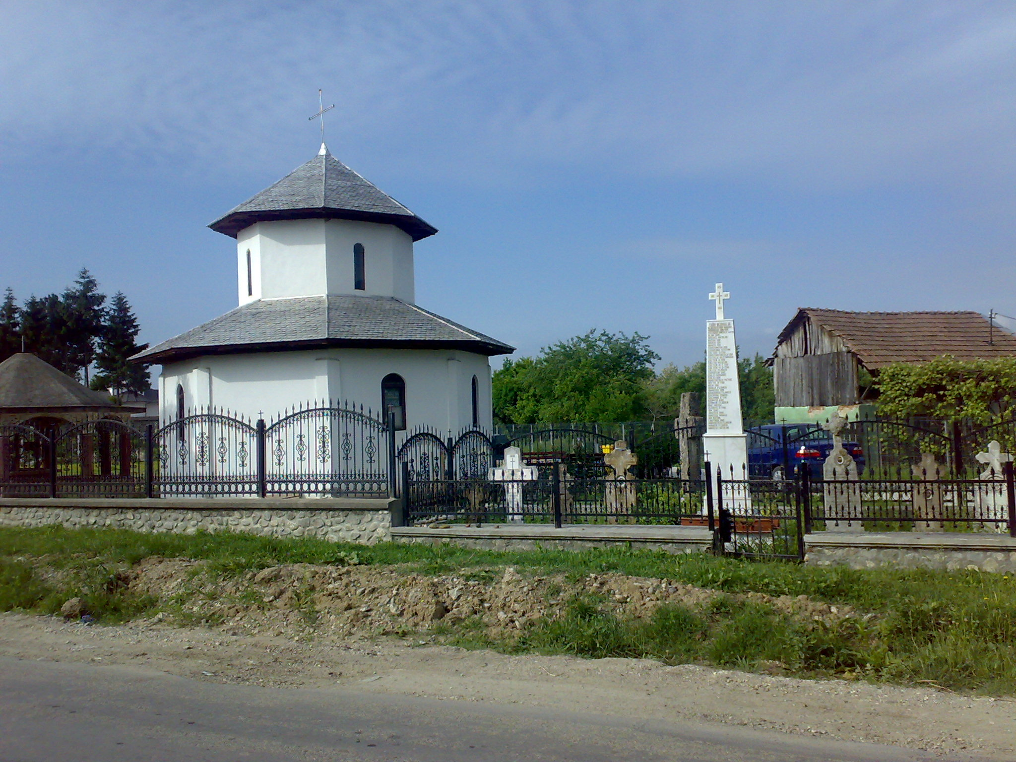 Biserica „Schimbarea la Față” și „Sf. Apostoli”-sat Fedeleșoiu; comuna Dăești 01